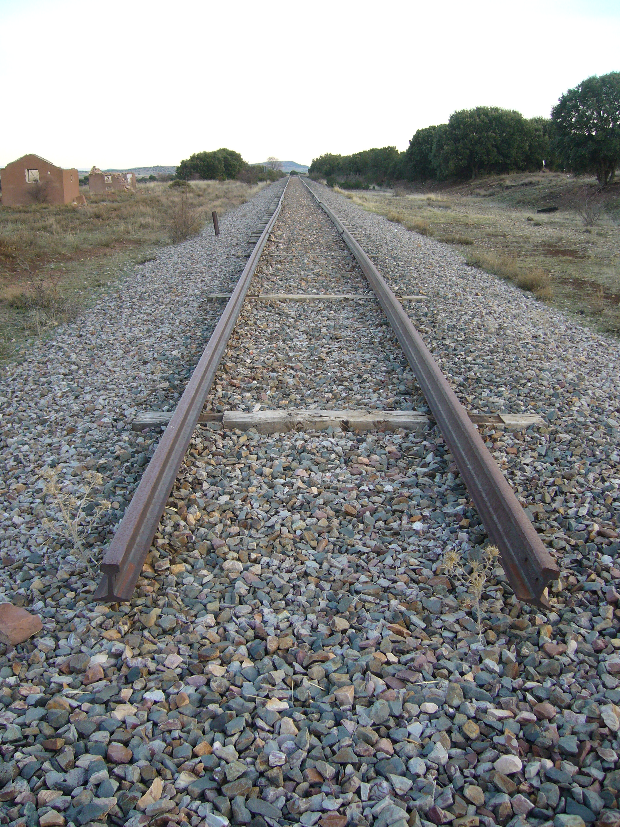 vies i travesses encara al terra a Ojos Negros